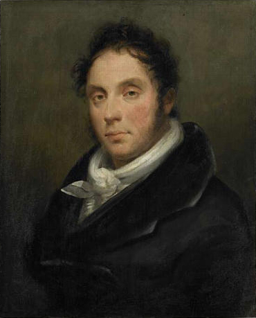 dans le salle de peinture du musée.